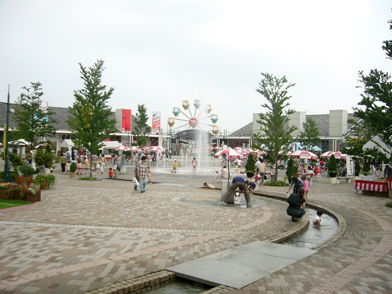 Michinoeki Fujioka (Gunma) (道の駅ふじおか)